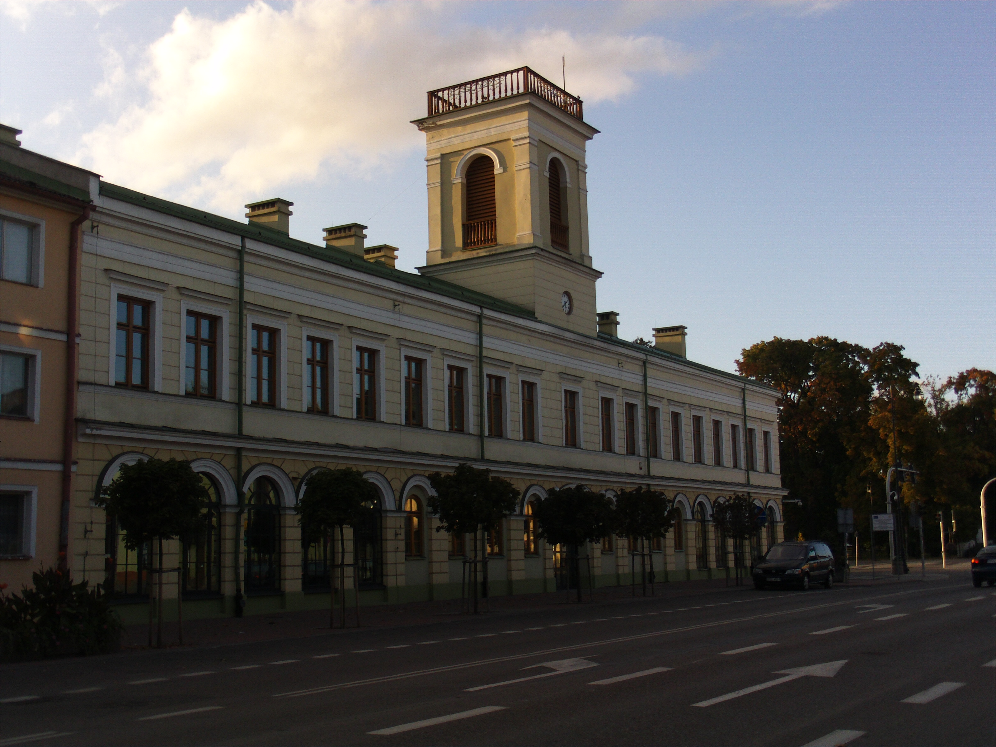 Ratusz Miejski w Suwałkach